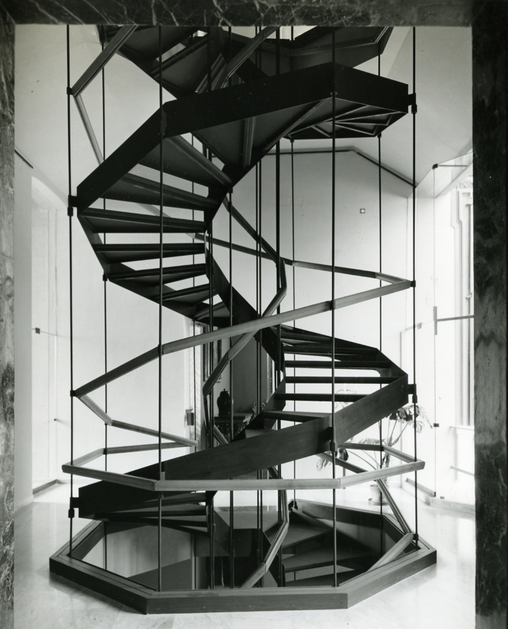 Genova. Galleria di Palazzo Rosso. Ala sud, in corrispondenza delle sale 23, 29, 35. Scala ottagonale sospesa, particolari. Servizio fotografico : Genova, 1963 / Paolo Monti. - Stampe: 5 : Positivo b/n, gelatina bromuro d'argento/ carta, 24x30. - ((Al verso delle stampe manoscritti e impressi con a inchiostro i numeri dei negativi corrispondenti: 41794 (numerata anche 7370, lo stesso numero identifica 2 stampe - 2 copie), 46594. - Sul coperchio della scatola iscrizione didascalica manoscritta a pennarello nero: "Architett. Moderna". - Occasione: Documentazione del restauro e dell'allestimento ad opera dell'architetto Franco Albini. - Fonte: Quaderno di Paolo Monti: V. Appunti/ Museo Palazzo Rosso - Genova (s.d.), presso Archivio Paolo Monti